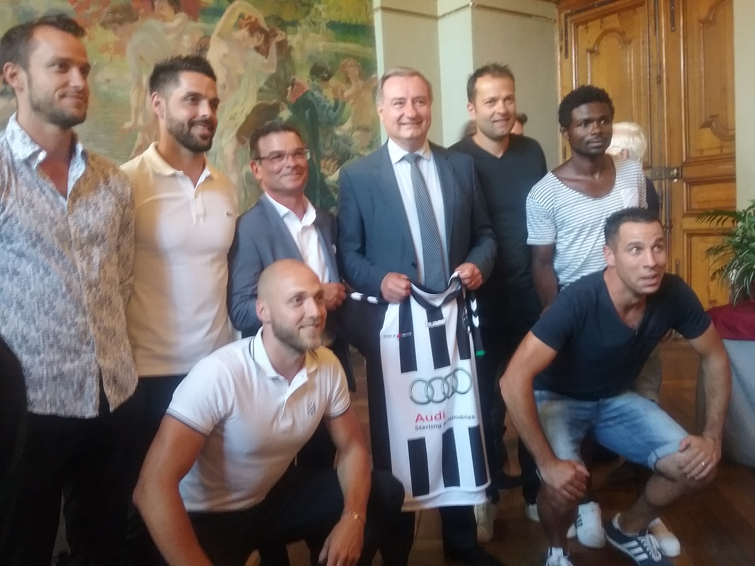 En présence de Monsieur Jean Luc Moudenc, Maire de Toulouse, une réception a été organisée à l’honneur du nouveau Club Toulouse Métropole Football Club, après la fusion des deux clubs historiques de Toulouse, le Toulouse St-Jo et le Toulouse Fontaines.